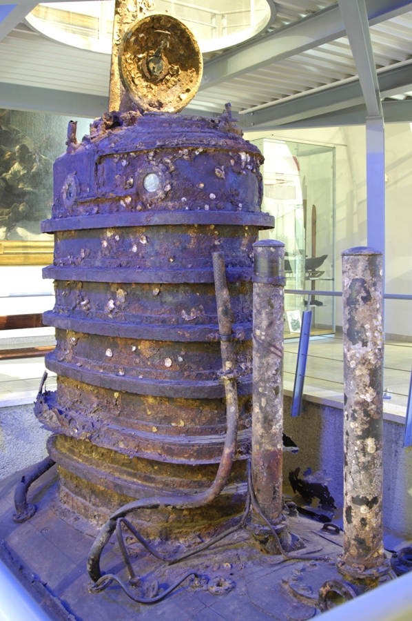 Turm des k.u.k. U-Bootes U20 im Saal VIII (Marinesaal) des des Heeresgeschichtlichen Museums in Wien